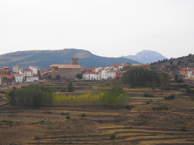 Vista panorámica de Vistabella y el pico Peñagolosa al fondo